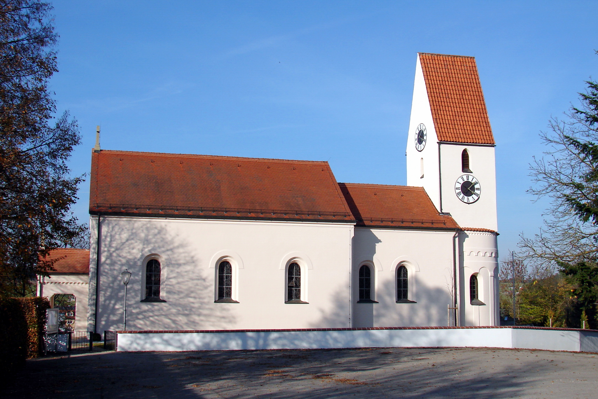 Kath. Kirche "Jakobus der Ältere"